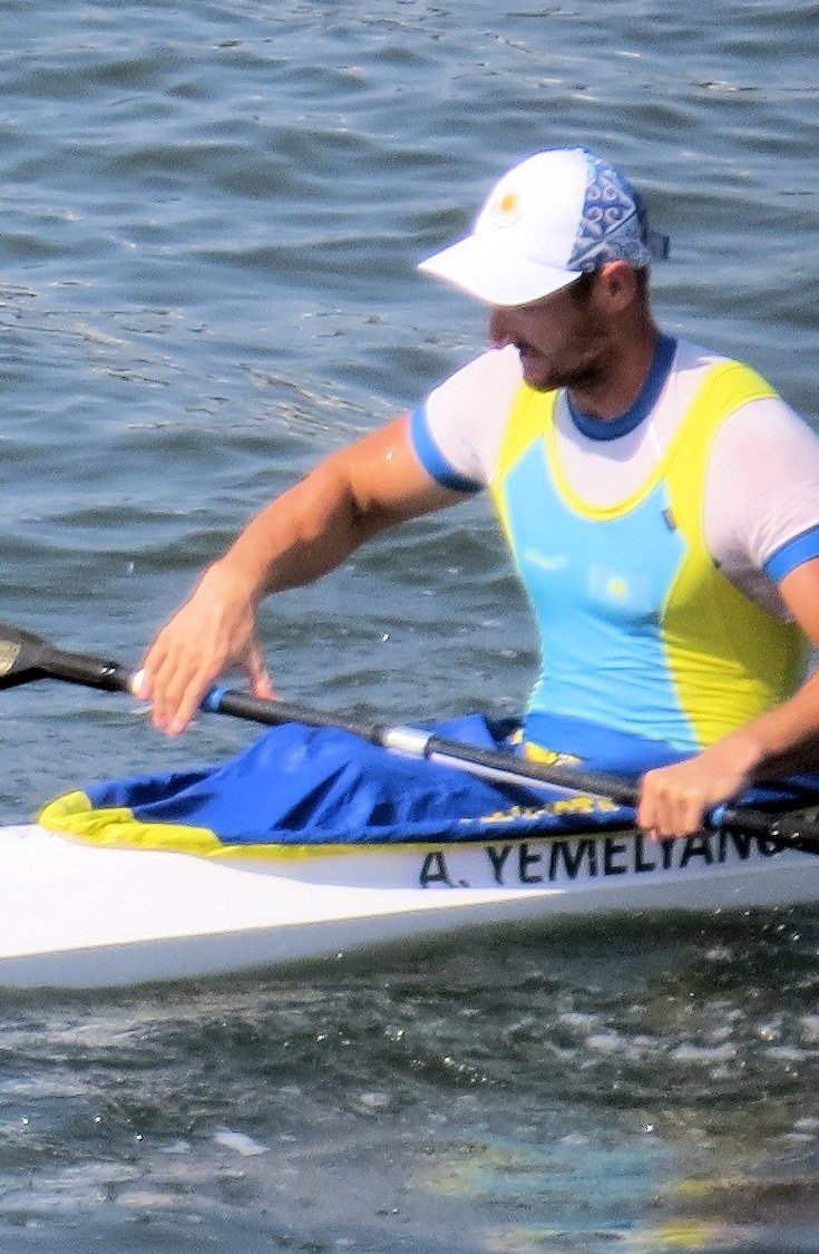 Sx50